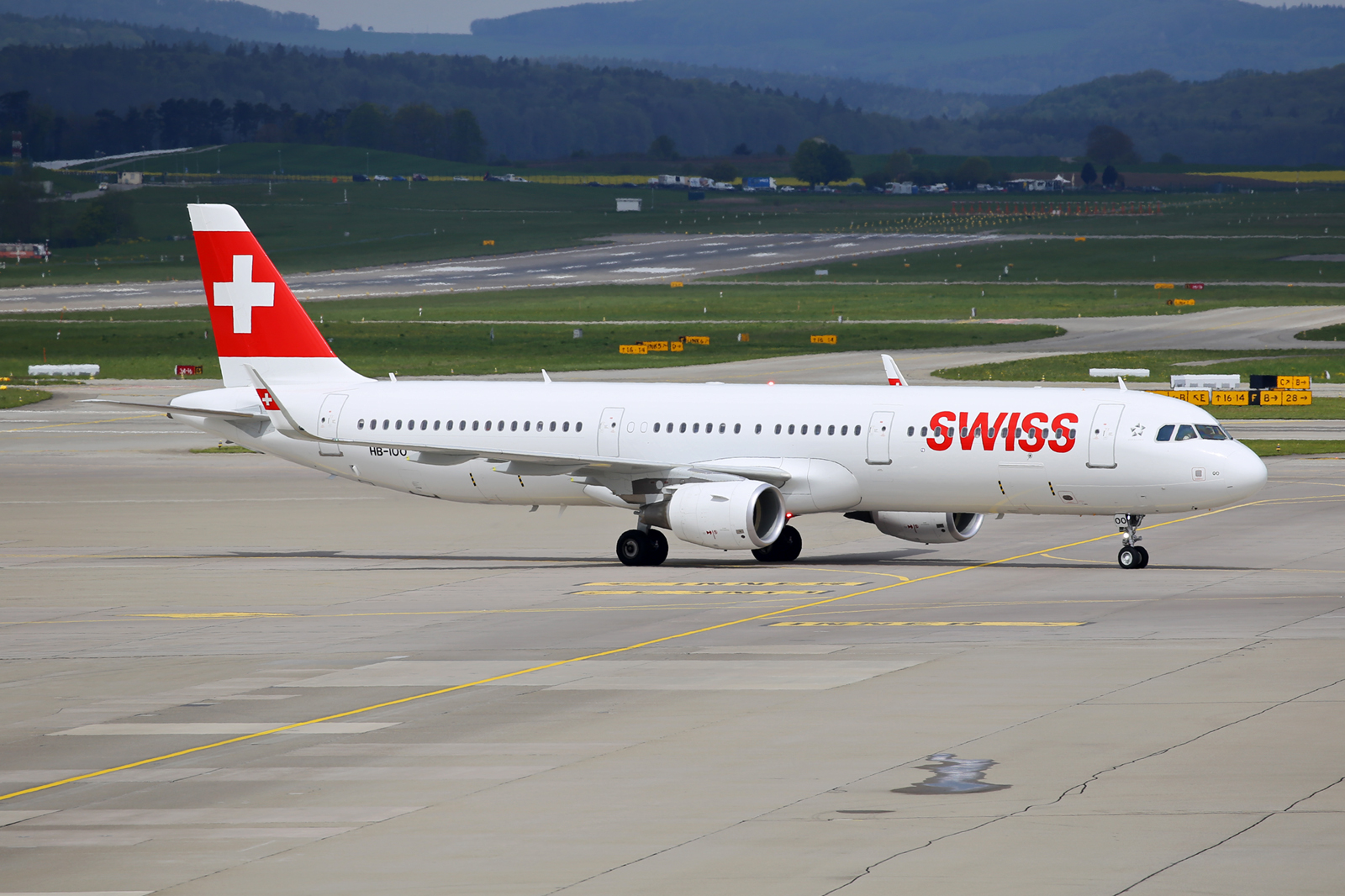 Zürich (- Kloten) (ZRH / LSZH) Switzerland 4.2016